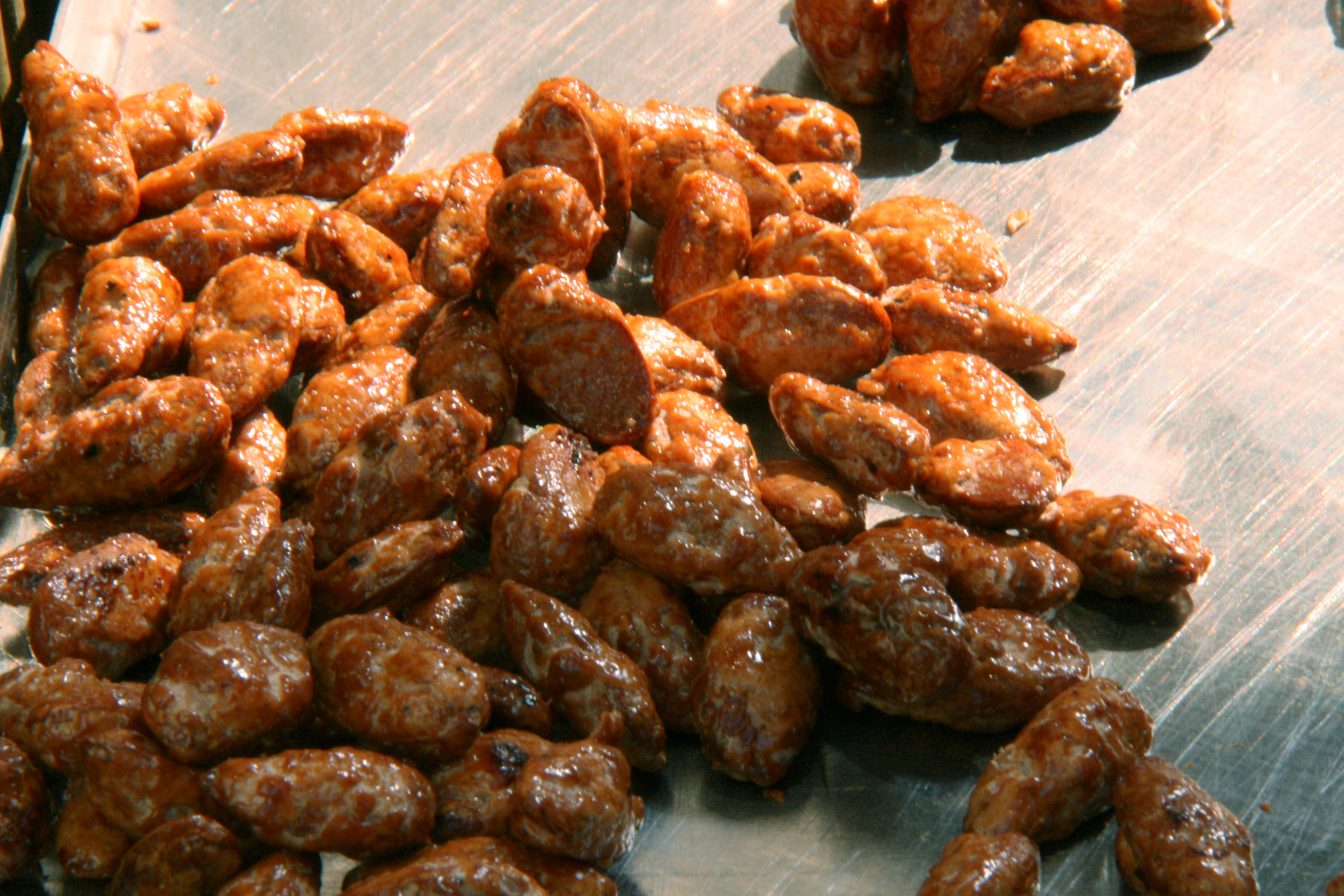 Almendras garrapiñadas